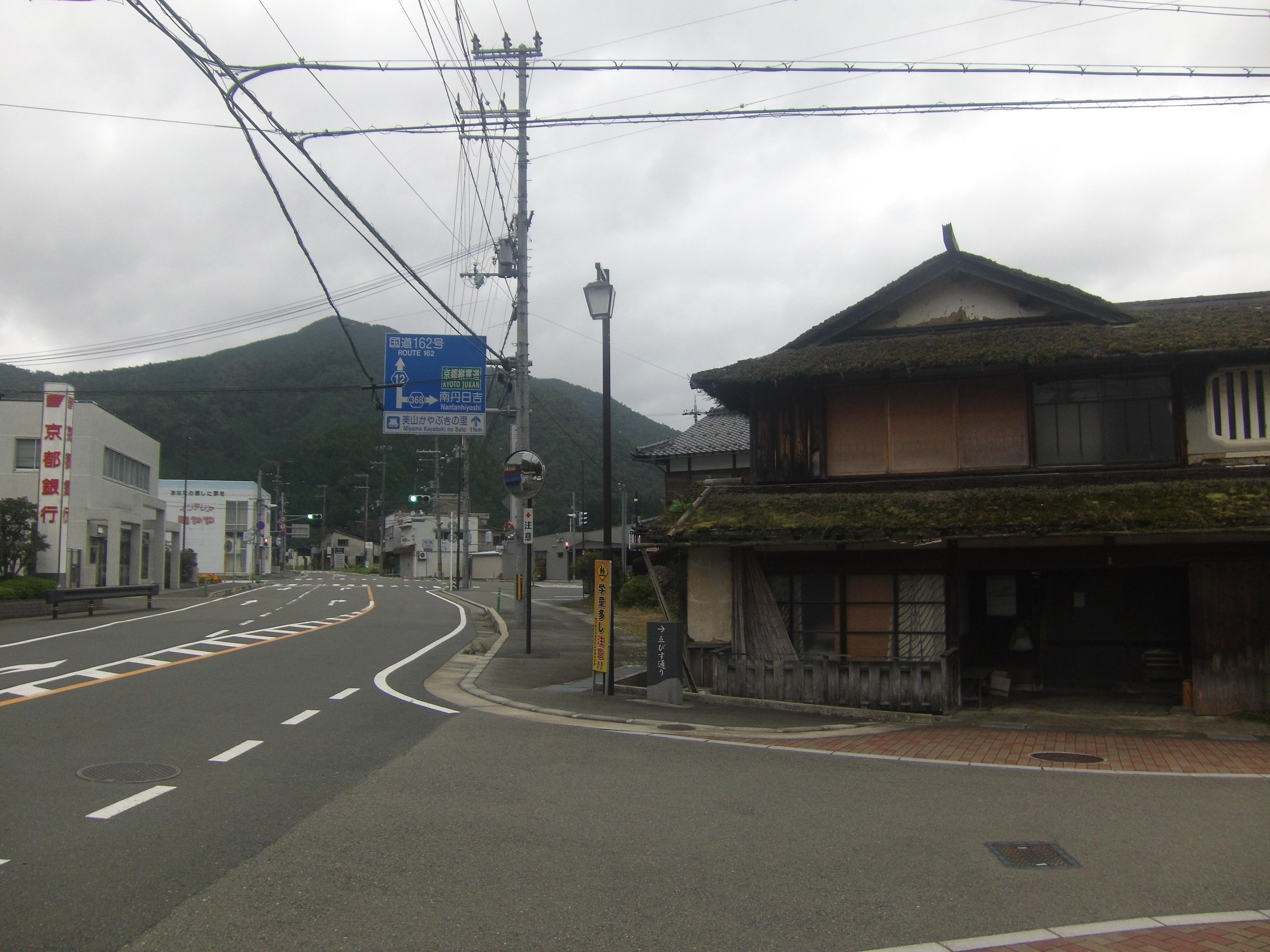 南丹市美山町和泉の京都府道12号線